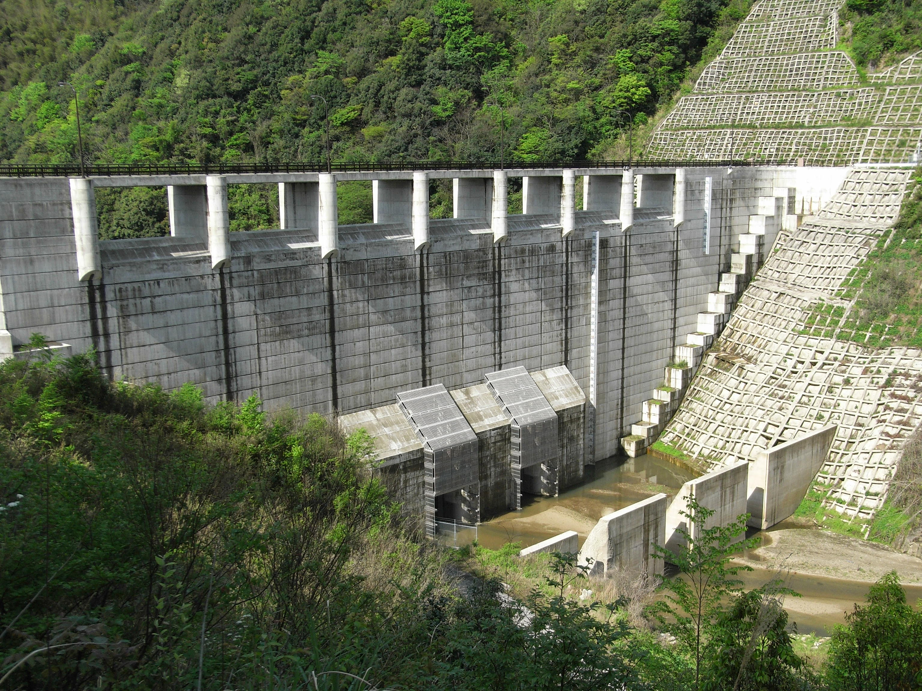 Dam